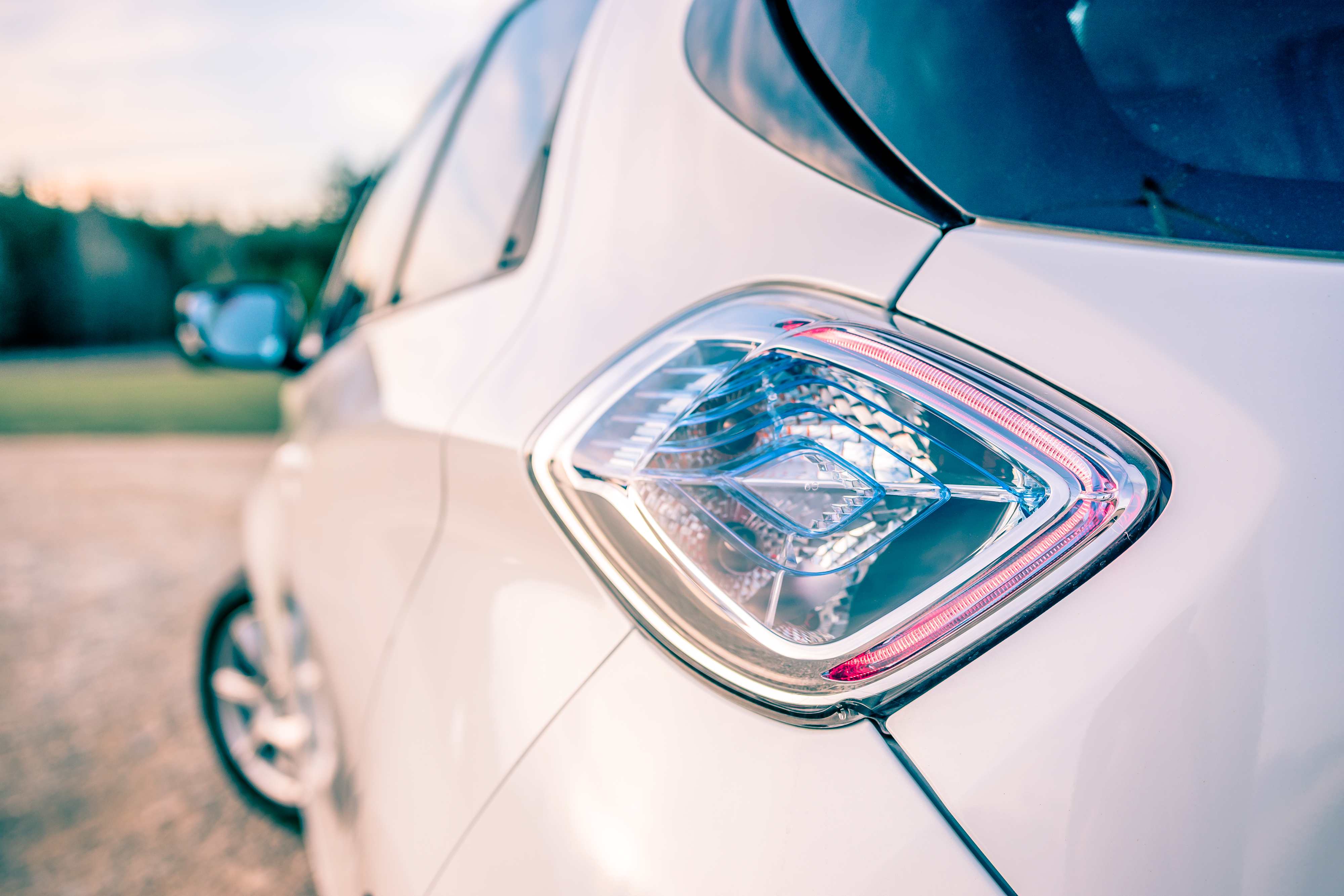 Renault ZOE Q210